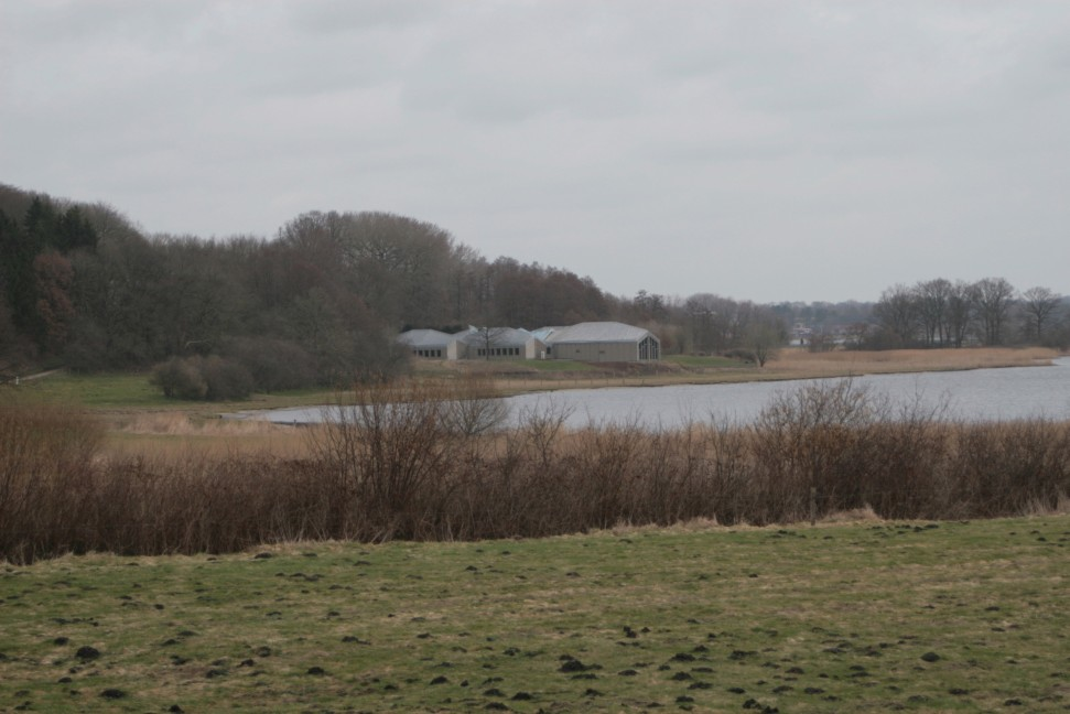 Wikinger Museum Haithabu am Haddebyer Noor